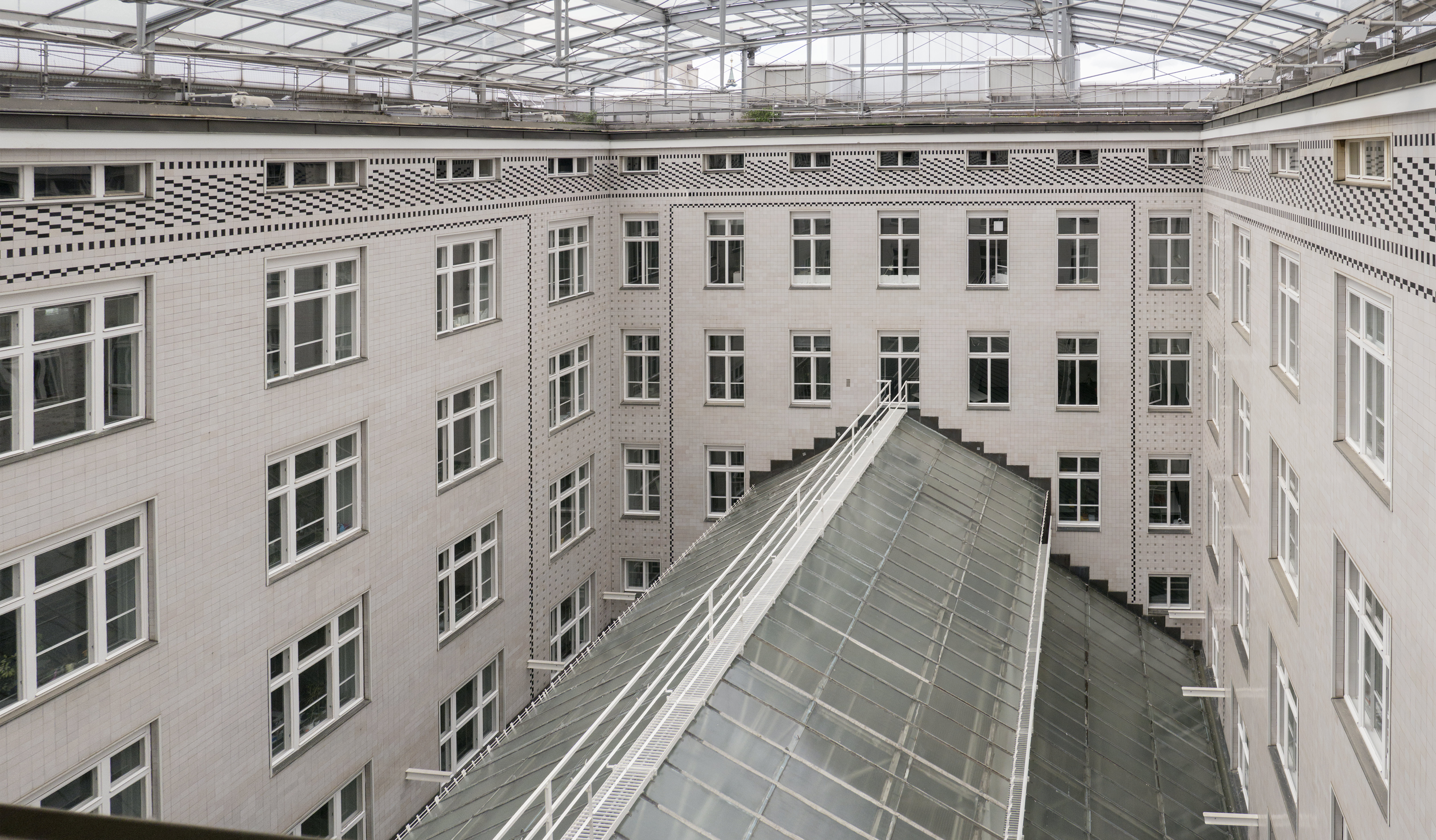 Postsparkasse